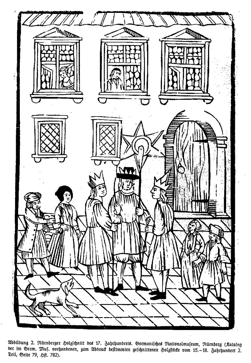 Sternsinger, Nürnberger Holzschnitt des 17. Jahrhunderts